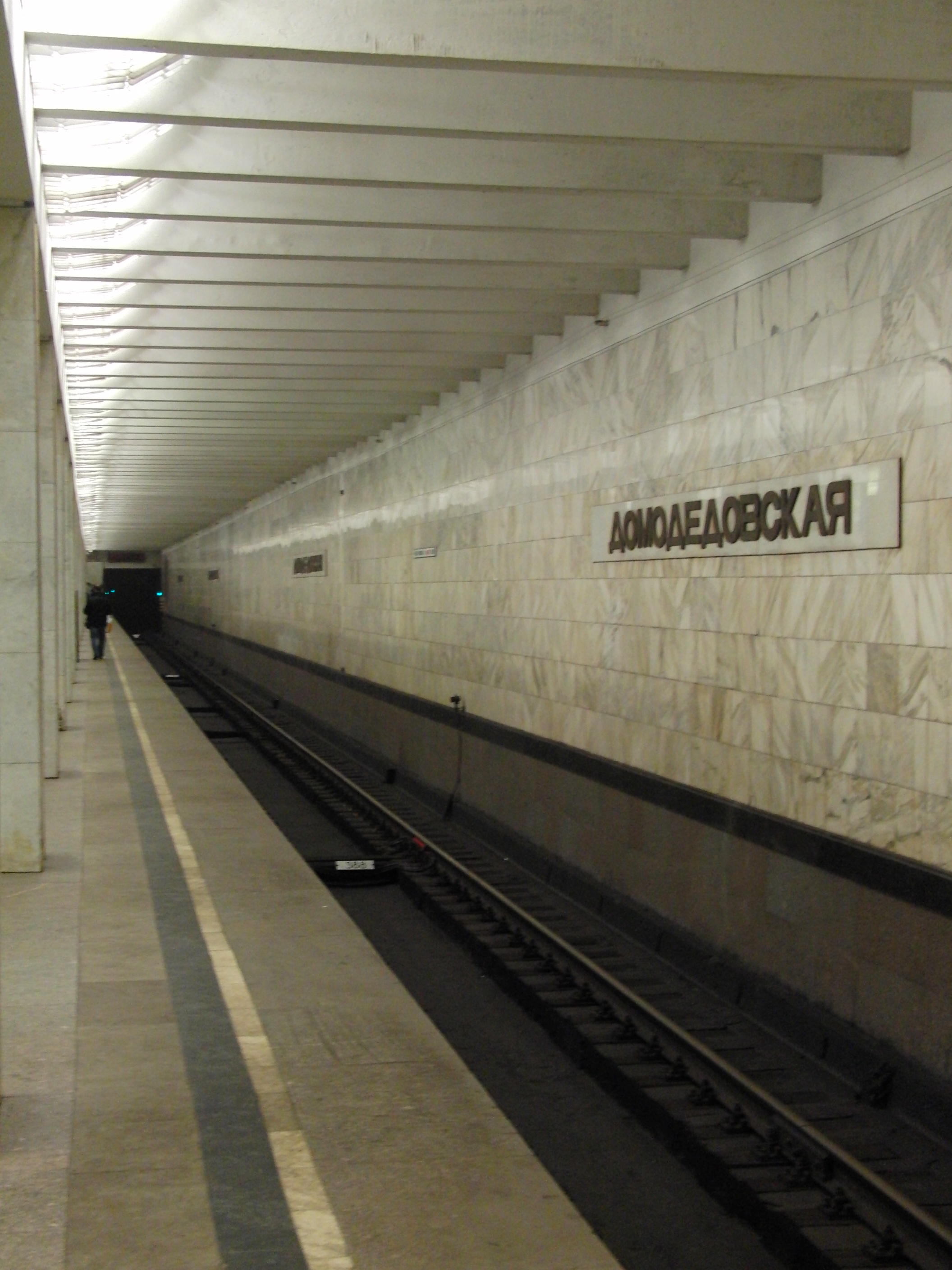 Domodedovskaya (Домодедовская)